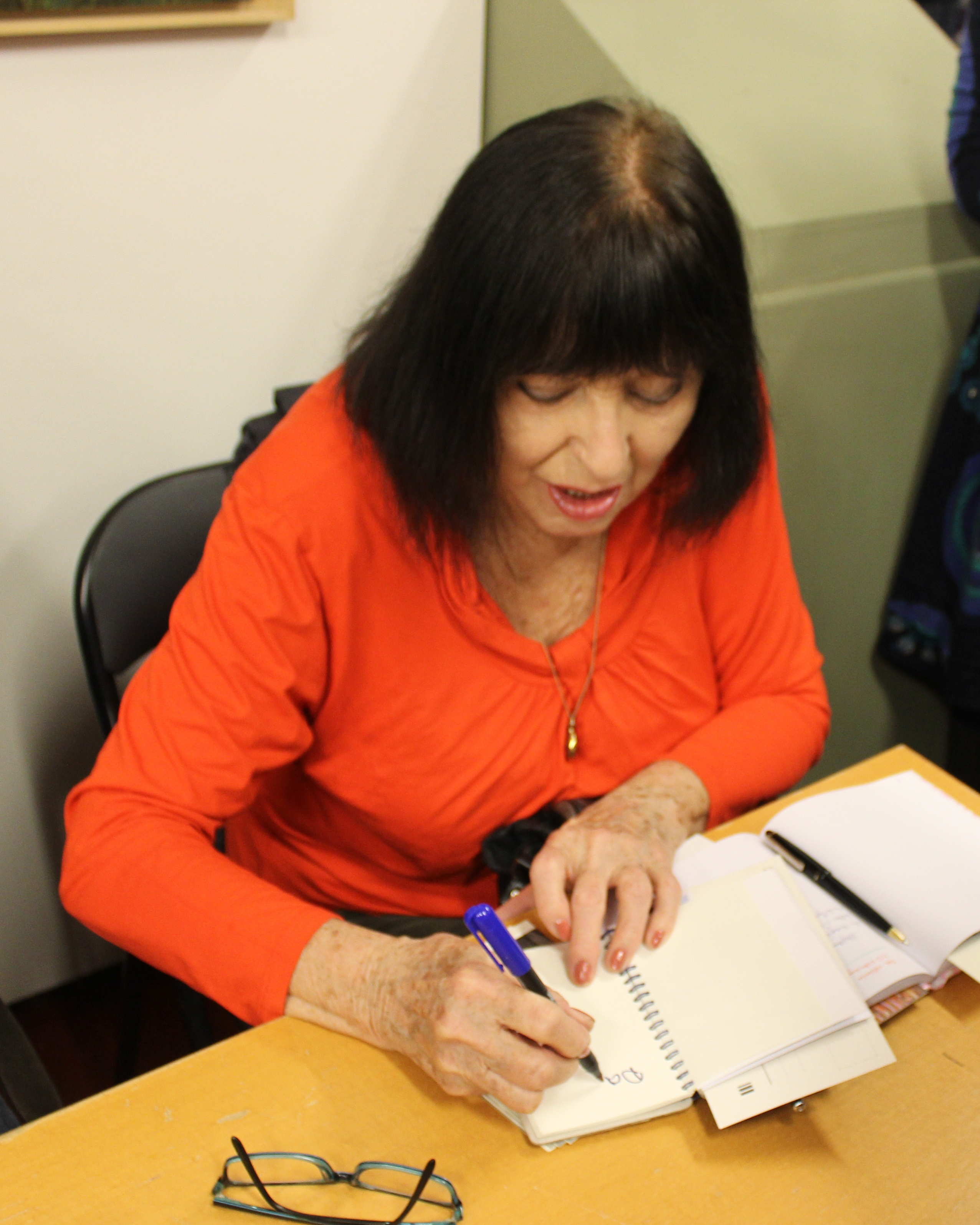 Účinkující na Maxiautogramiádě konané v pražské galerii Mánesova 54 péčí Vratislava Ebra.